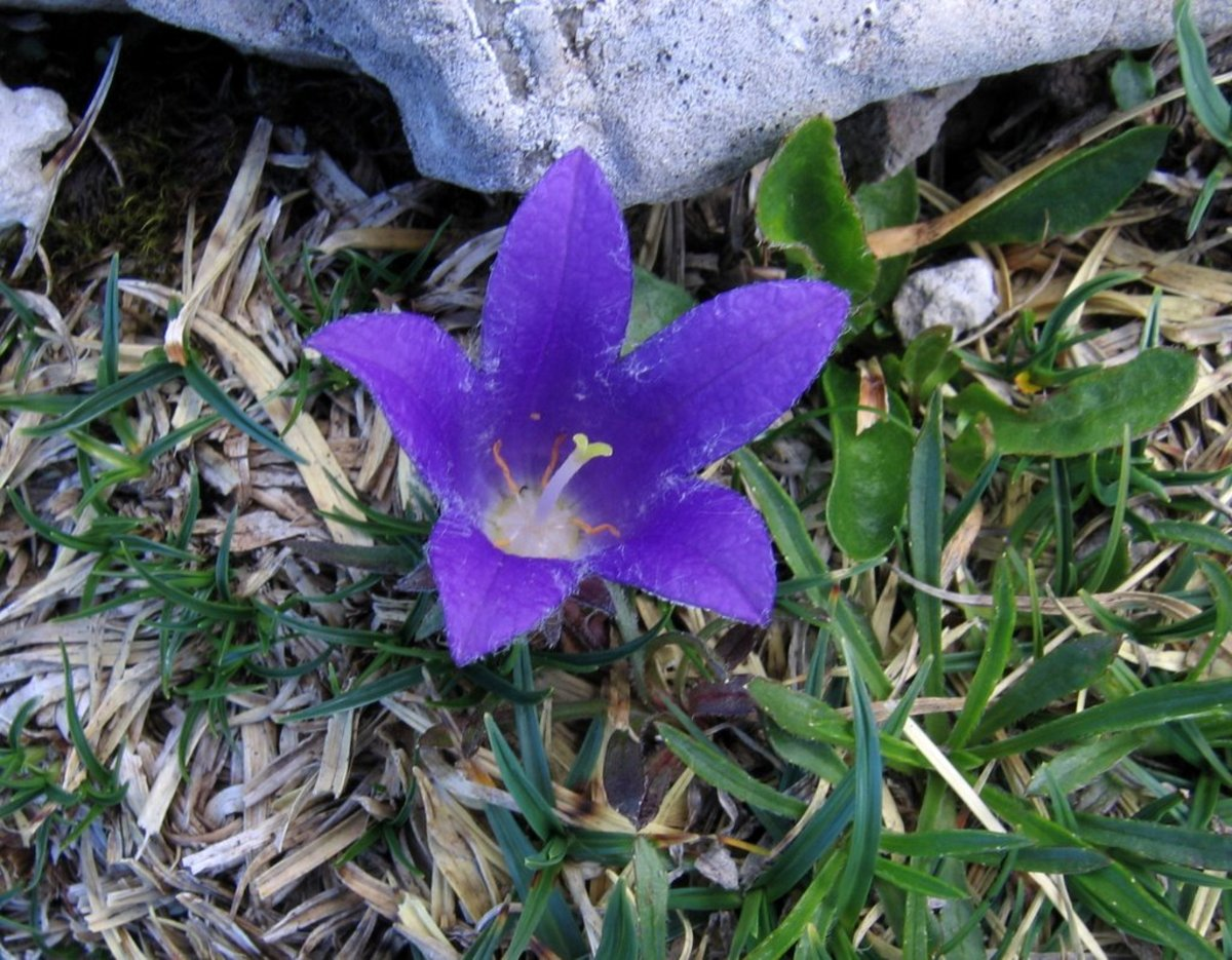 Travnolistna vrčica na Snežniku.